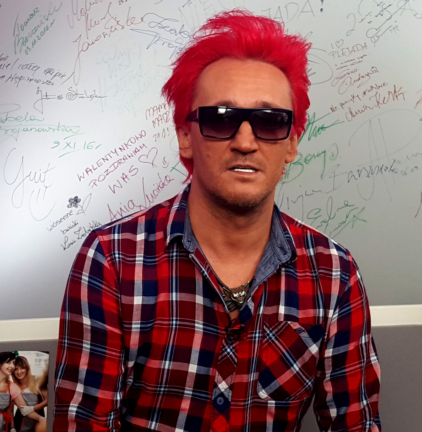 Polski wokalista Michał Wiśniewski we wrześniu 2017 roku.